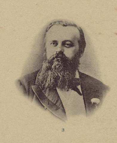 Juan Madrazo y Kuntz: arquitectos restauradores de la Catedral de León